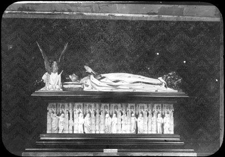 Fonds Trutat - Photographie ancienne Cote : TRU C 2616 Localisation : Fonds ancien (S 30) Original non communicable Titre : Tombeau de Jean sans Peur, duc de Bourgogne, Dijon Auteur : Trutat, Eugène Rôle de l’auteur : Photographe Lieu de création : Dijon (Côte-d'Or) Date de création : 1859-1910 [entre] Mesures : : 8,5 x 10 cm Observations : Note manuscrite de Trutat : " Dijon : tombeau des ducs ". Mot(s)-clé(s) : -- Intérieur -- Tombeau -- Gisant -- Prière -- Sculpture -- Bas-relief -- Chef d'Etat identifié -- Personnage historique -- Jean sans Peur, duc de Bourgogne -- Dijon (Côte-d'Or) -- Côte-d'Or (France) -- Bourgogne (France) -- 19e siècle, 2e moitié -- 20e siècle, 1e quart -- 15e siècle Médium : Photographies -- Positifs sur plaque de verre -- Noir et blanc -- Représentations d'objets -- Détourage au papier collé -- Reproductions d'oeuvre d'art Bibliothèque de Toulouse. Domaine public